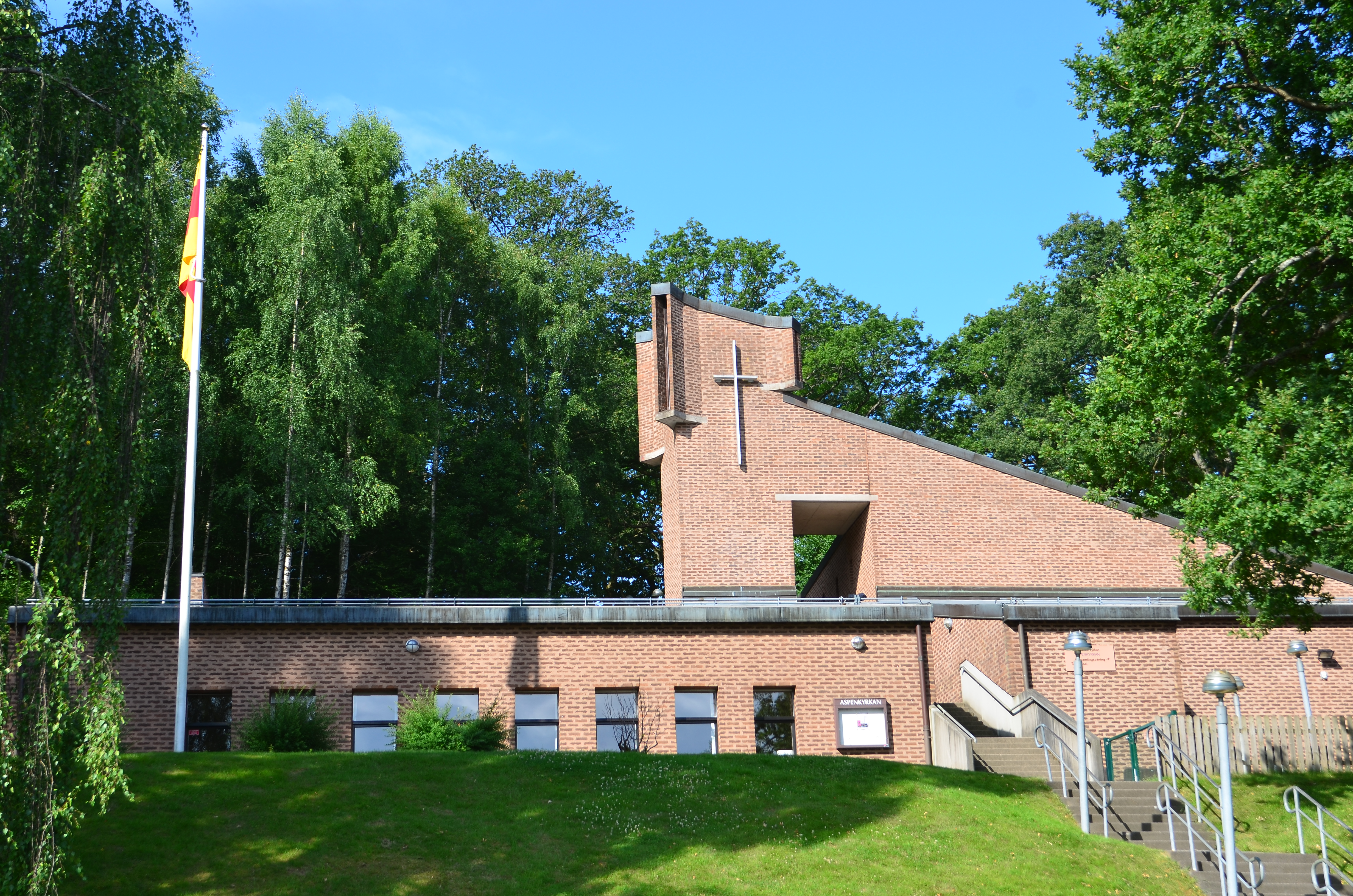 Aspenskyrkan (Bråta 20:1)